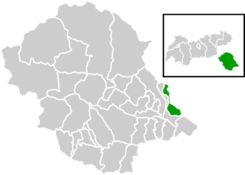 Lage der Gemeinde innerhalb des Bezirks Lienz